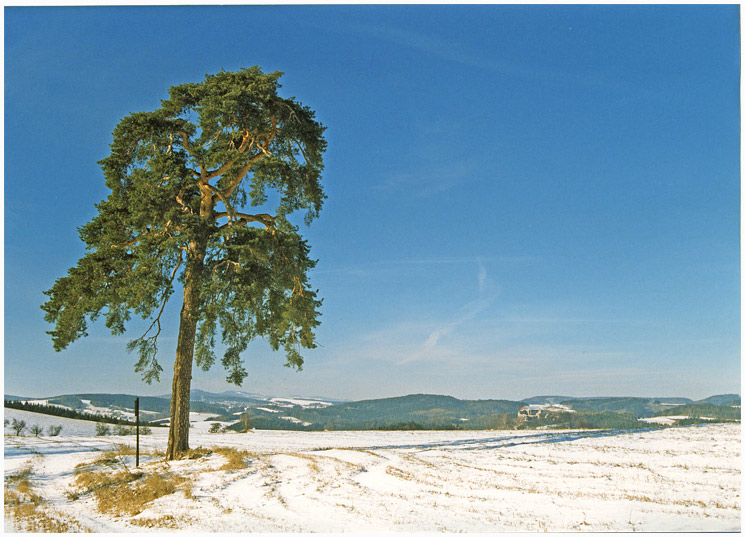 Borovice u Pecky.